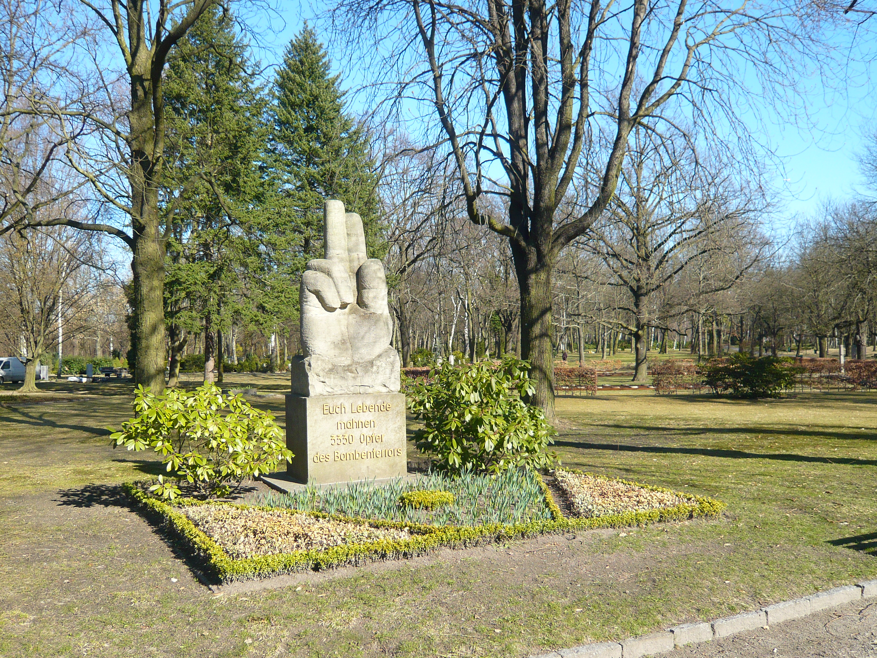 Ortsteil Marzahn: Parkfriedhof Wiesenburger Weg